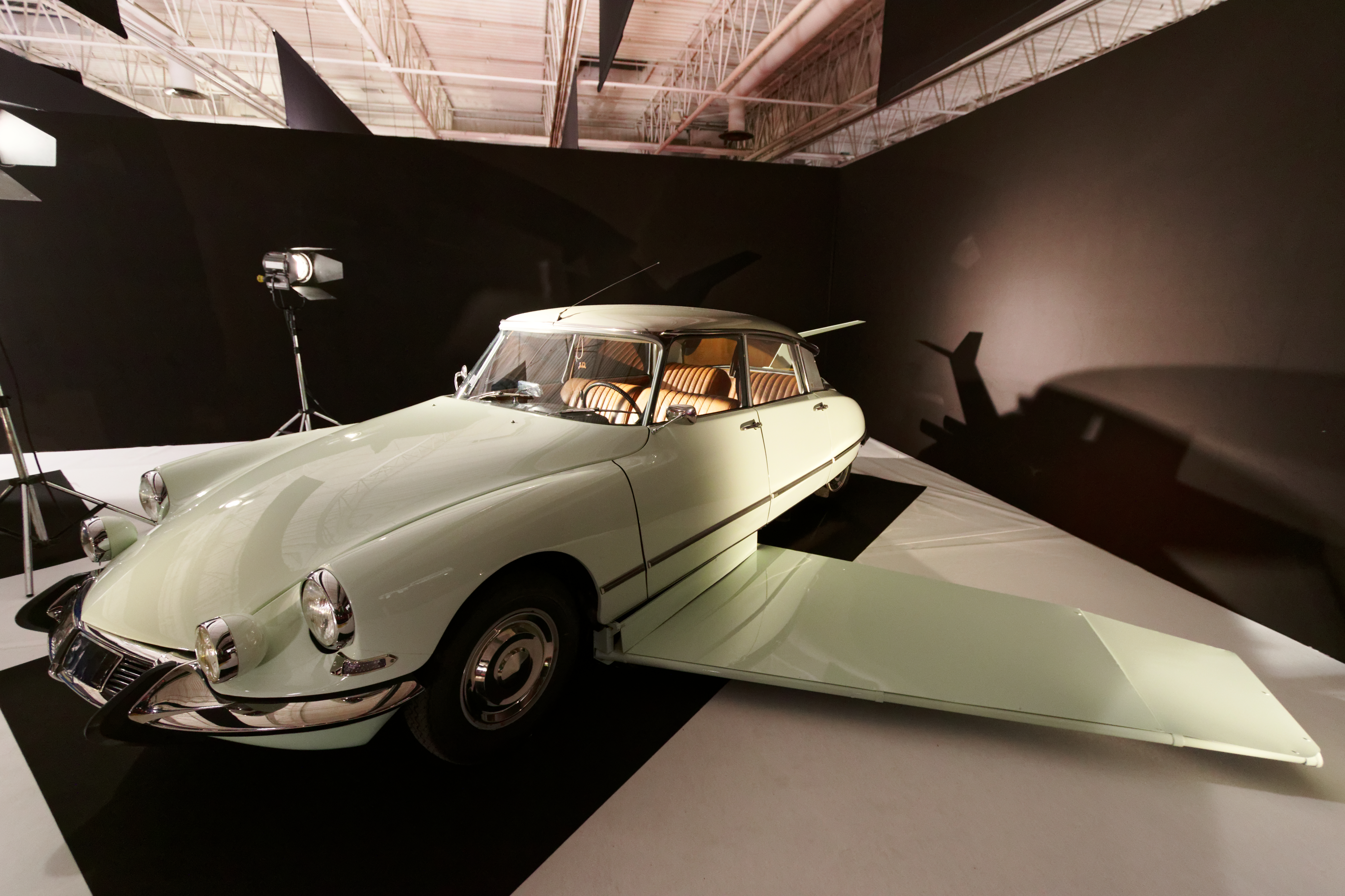 La Citroën DS 19 de 1964, ou « DS volante » de Fantômas, utilisée sur le tournage du film Fantômas se déchaîne (1965), ici présentée lors du Mondial de l'automobile de Paris, en 2016, dans l'exposition Moteur ! L'automobile fait son cinéma.